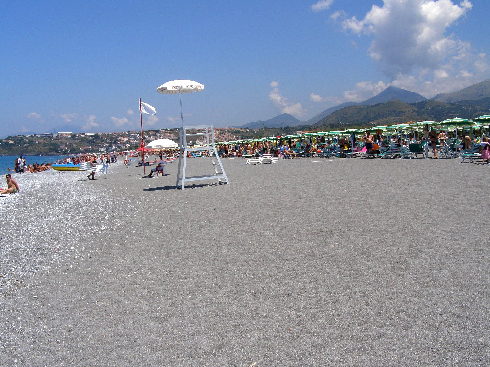 Platená pláž v južnej časti mesta